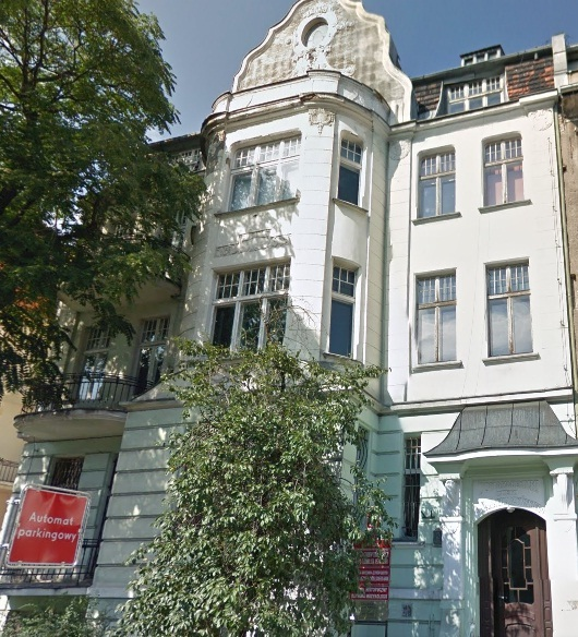 Budynek dydaktyczny UAM ul. Juliusza Słowackiego 20